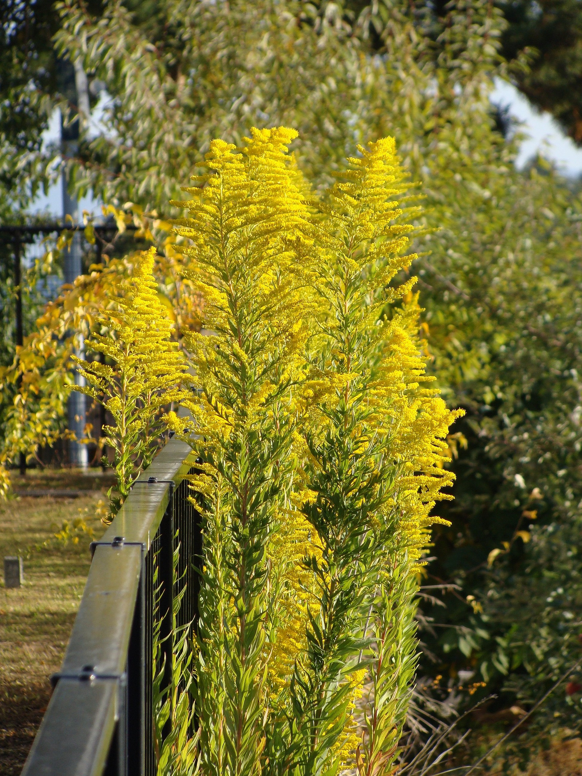 canadensis_var_scabra_Canada_goldenrod